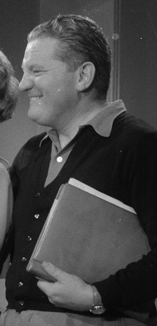 Gisela Fritsch & Alfred Bittins, 1957 Collectie / Archief : Fotocollectie Anefo Reportage / Serie : [ onbekend ] Beschrijving : Eerste opname Nederlandse kleurenspeelfilm in Cinetone studio te Rotterdam. $ Datum : 27 augustus 1957 Locatie : Rotterdam, Zuid-Holland Trefwoorden : Regisseurs, speelfilms Fotograaf : Pot, Harry / Anefo Auteursrechthebbende : Nationaal Archief Materiaalsoort : Negatief (zwart/wit) Nummer archiefinventaris : bekijk toegang 2.24.01.03 Bestanddeelnummer : 908-8984